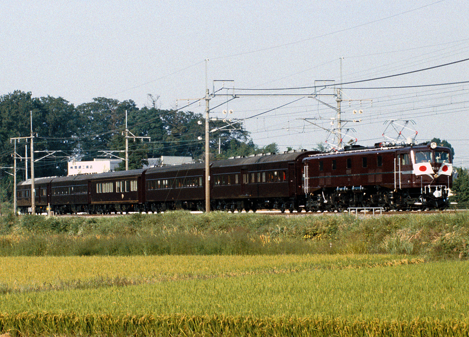 国鉄EF58 61けん引お召し列車